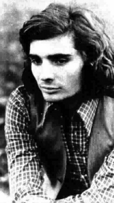 Italian singer Ciro Dammicco at "Un disco per l'estate" 1973